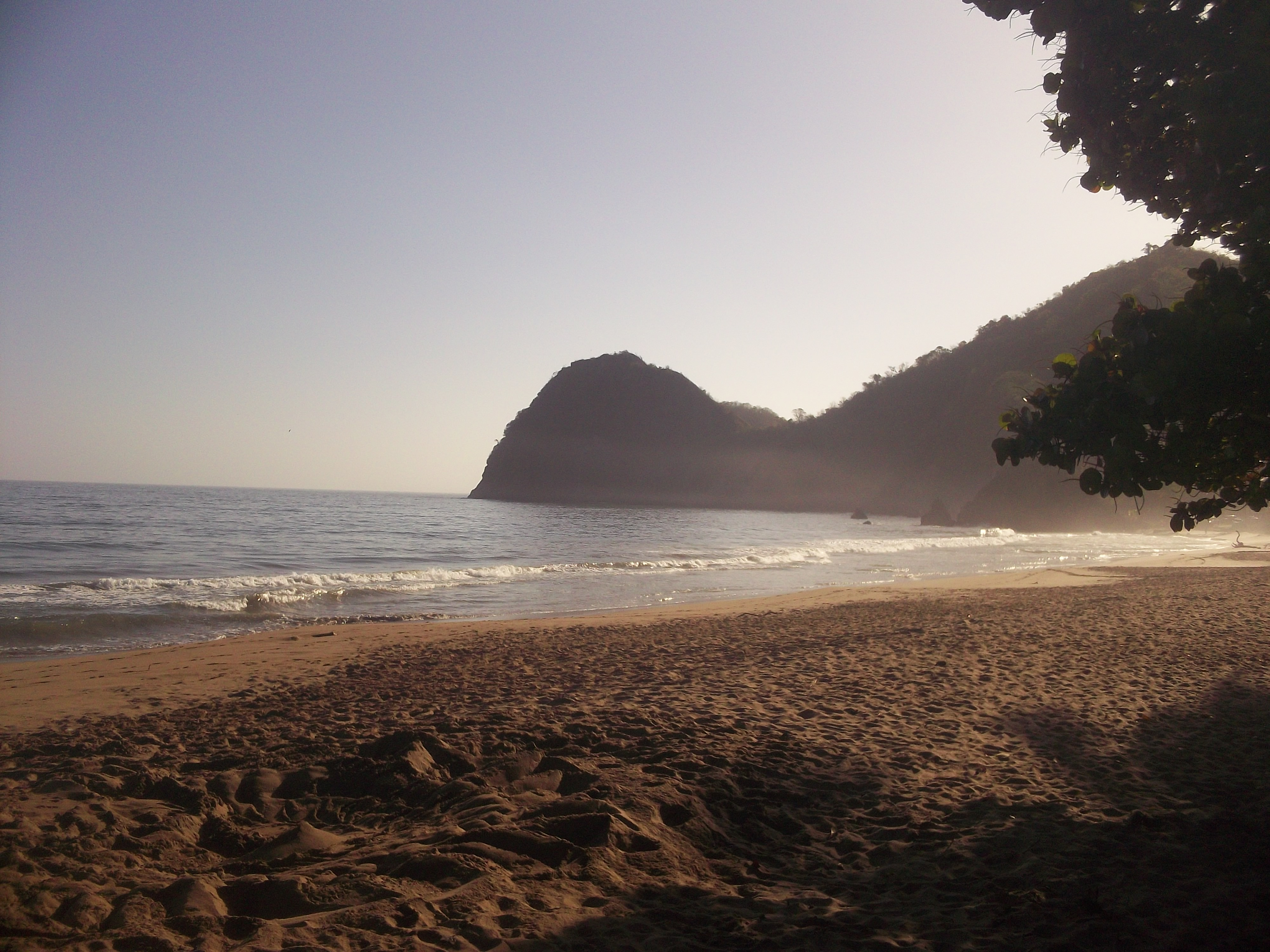 Amanecer en Querepare, estado Sucre, península de Paria, Venezuela